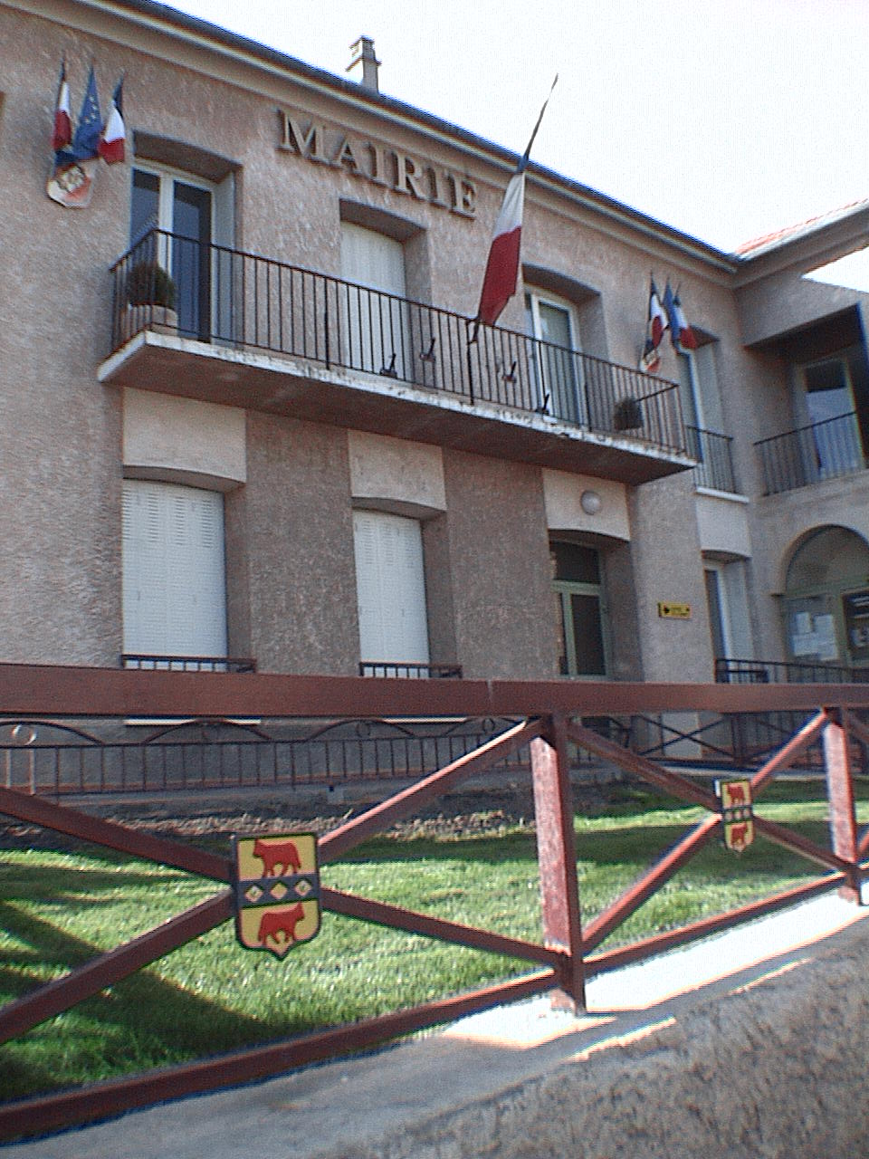 Marie d'Oraison (Alpes-de-Haute-Provence)